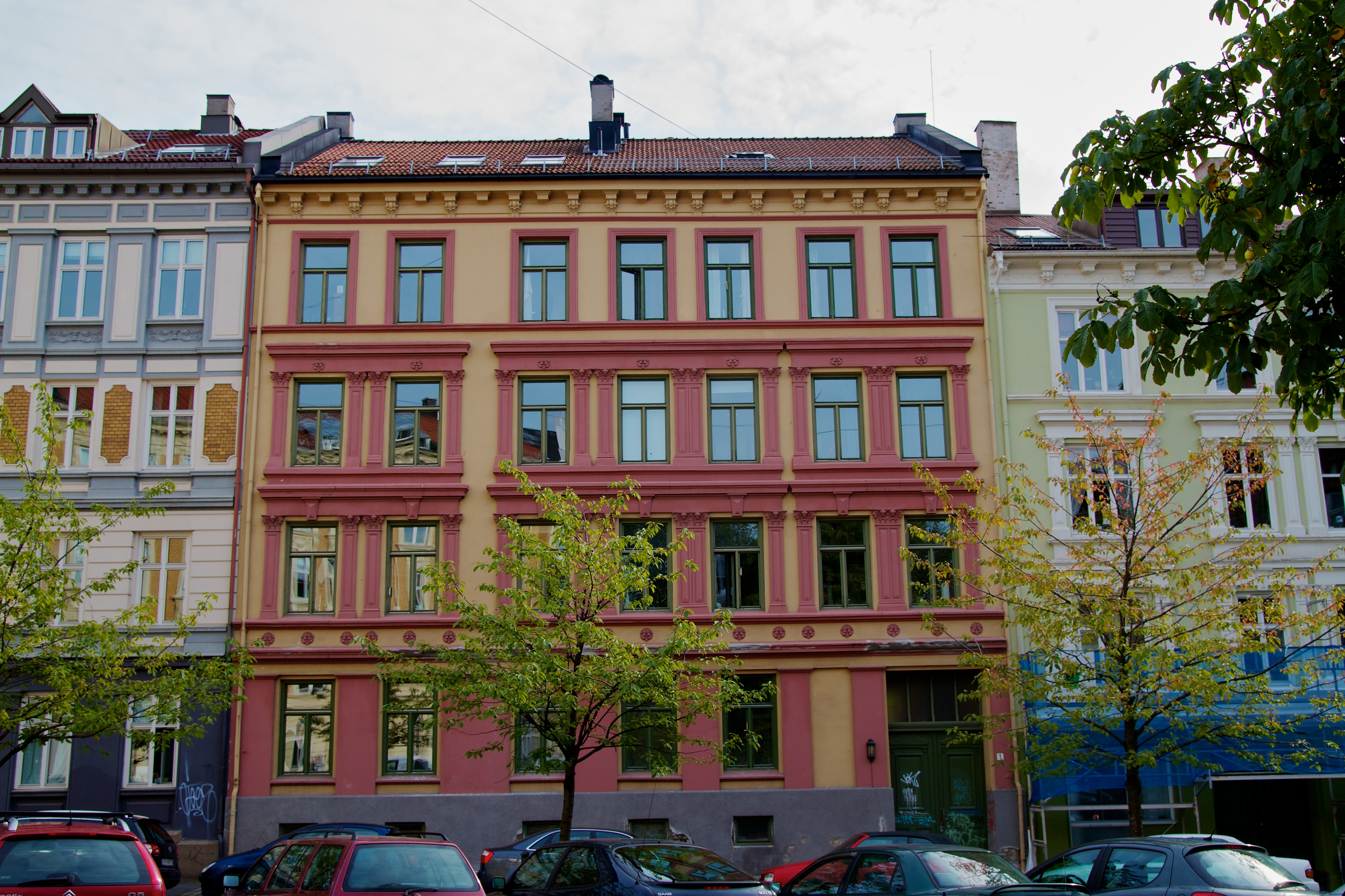 Øvrefoss 1 i Oslo. Fredet.